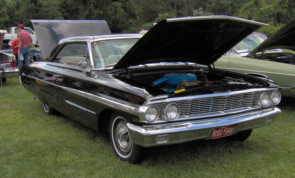 1964 Ford Galaxie 500 XL